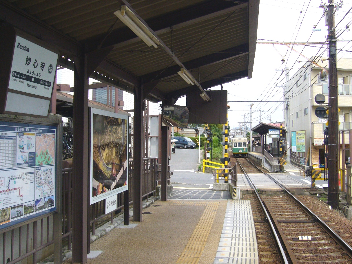 京福電気鉄道北野線妙心寺駅。北野白梅町駅方面ホームから帷子ノ辻駅方面ホームを望む。帷子ノ辻駅行き電車が接近中。2007年9月10日に投稿者が撮影。